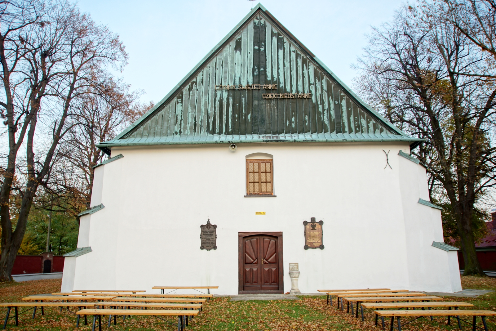 Jadowniki, na wzgórzu Bocheniec - rzymskokatolicki kościół filialny pw. św. Anny, 1732, XIX